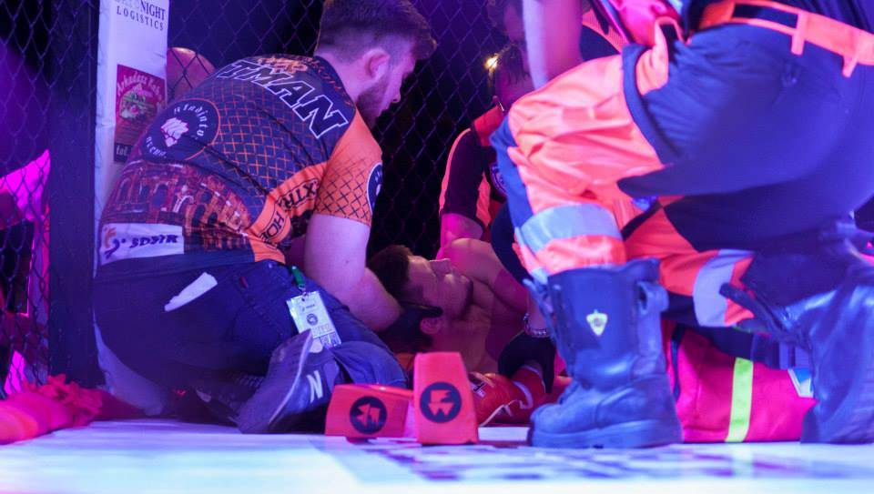 Pomoc udzielana zawodnikowi podczas gali MMA przez cutman'a.